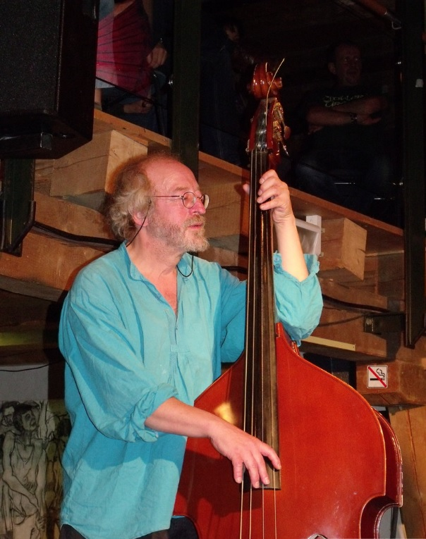 Foto: Angelika Link